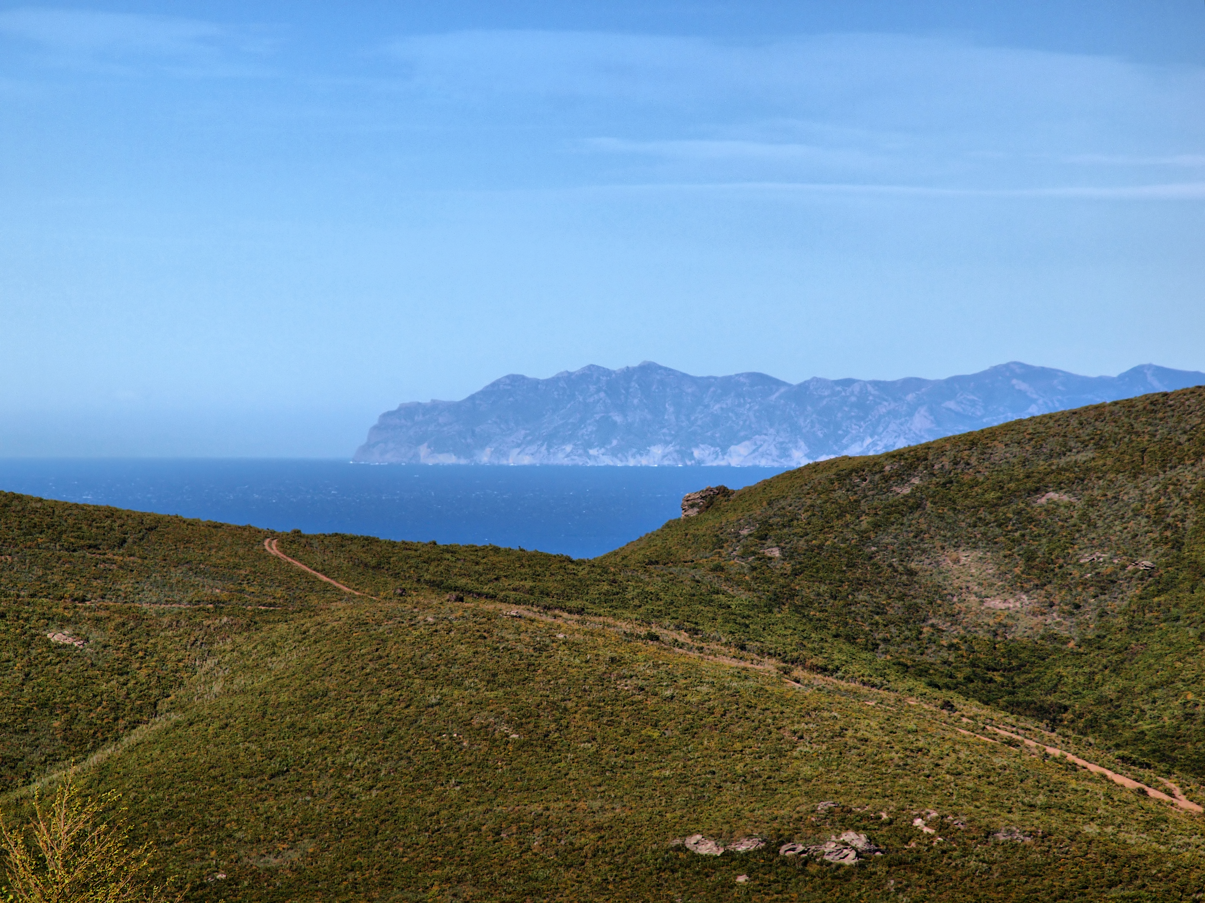 Sisco, Cap Corse (Corse) - Vue sur l'île d'Elbe et les collines au bas maquis de ciste, conséquence des fréquents incendies qui ont détruit le manteau végétal de la commune